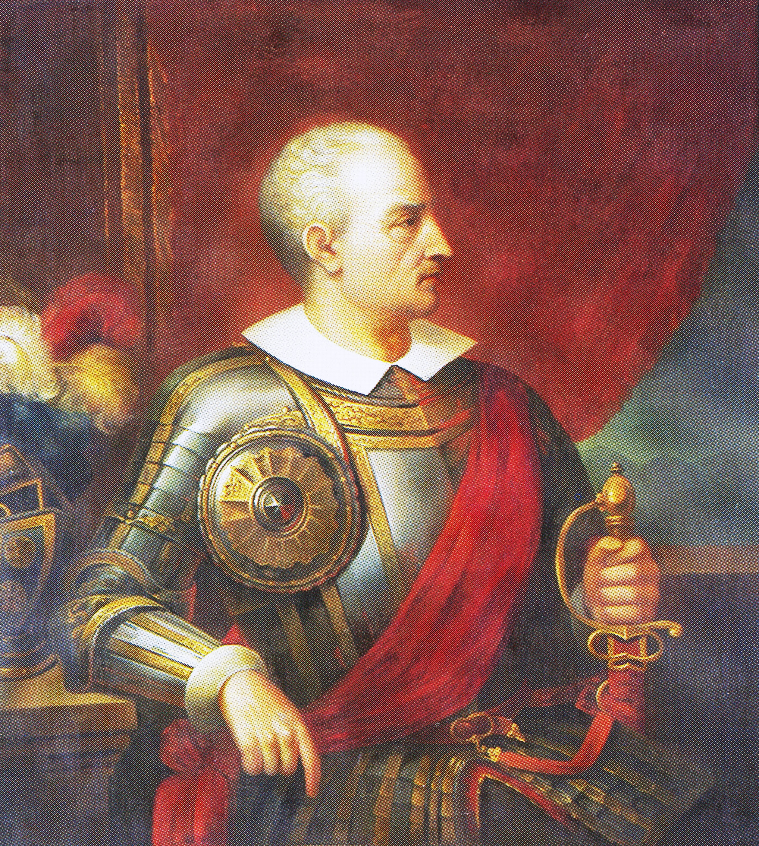 Colección del Museo Histórico Nacional de Chile (2009). La Pintura como Memoria Histórica. Dirección de Bibliotecas, Archivos y Museos de Chile, Santiago de Chile Año 2009. Imagen consultada en el Fondo de Bibliografía Digital del Archivo Histórico del Guayas (AHG) Guayaquil, Ecuador.